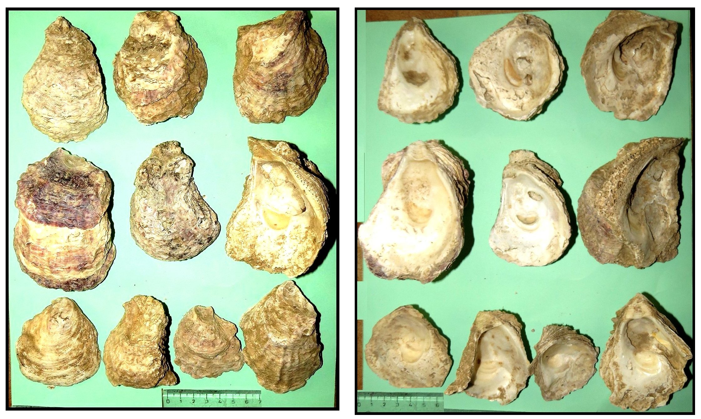 Coquilles (Chonchyliorestes) d' Ostrea edulis, faces externes et internes de valves inférieures ou creuses. Dépotoir, villa romaine de Vivios, Lespignan (Occitanie)